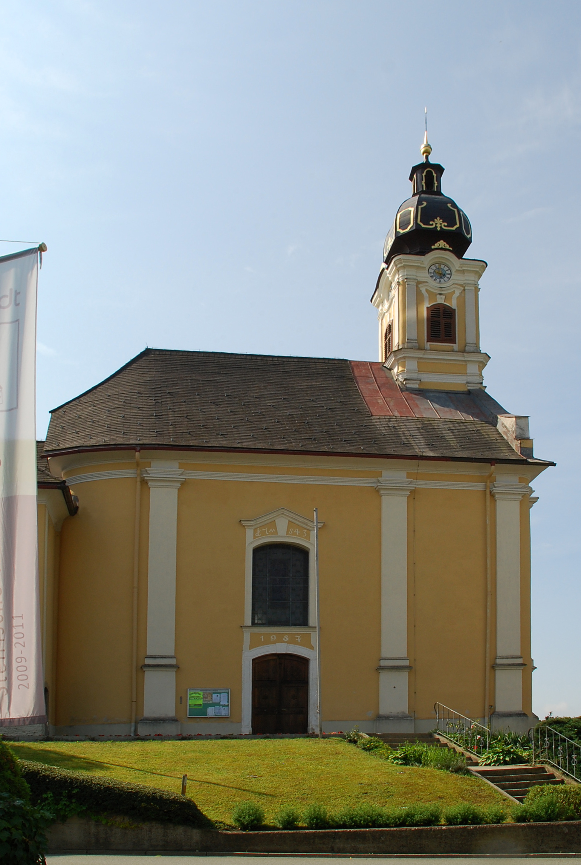 Sulmeck-Greith, Ortsteil Kopreinig, Steiermark, Österreich: Kirche St. Ulrich im Greith